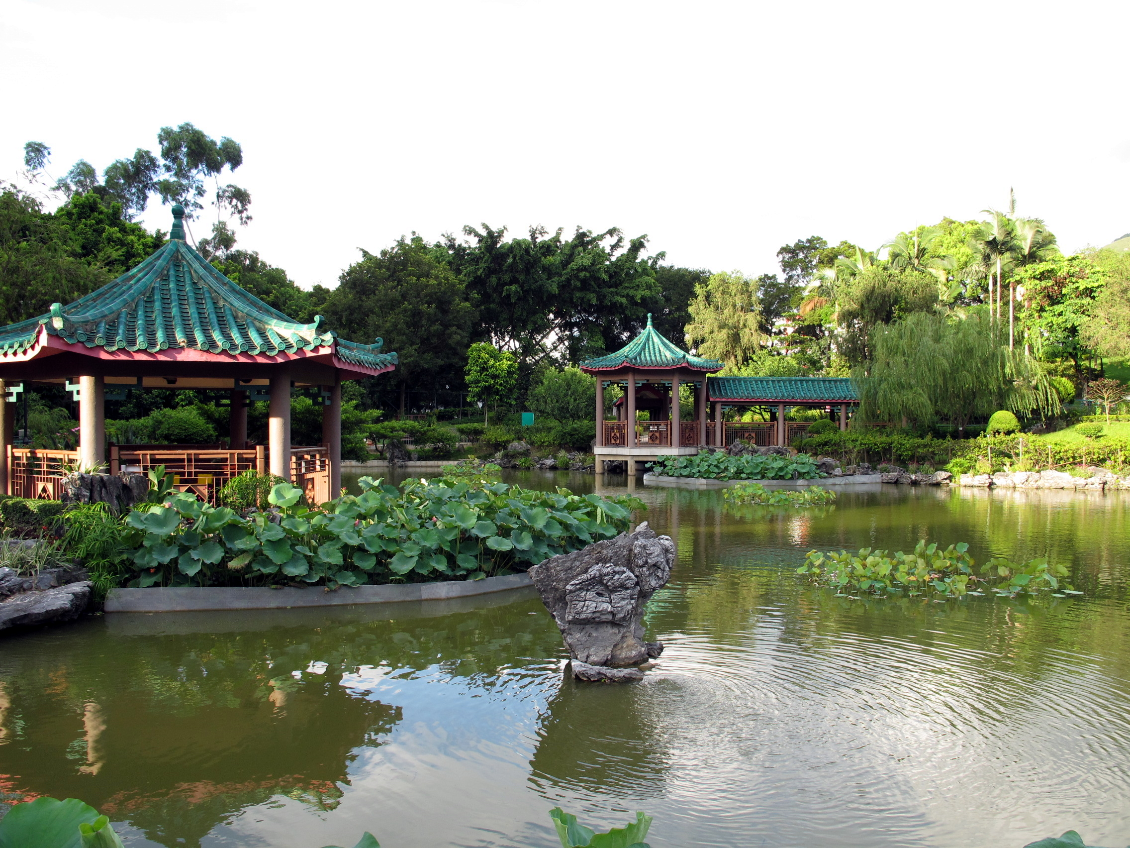 Fanling Hong Lok Park